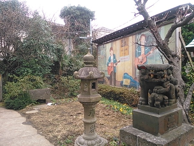 横浜市磯子区岡村、岡村天満宮境内の様子